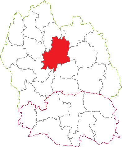 Situation du canton dans le département de la Lozère (France)